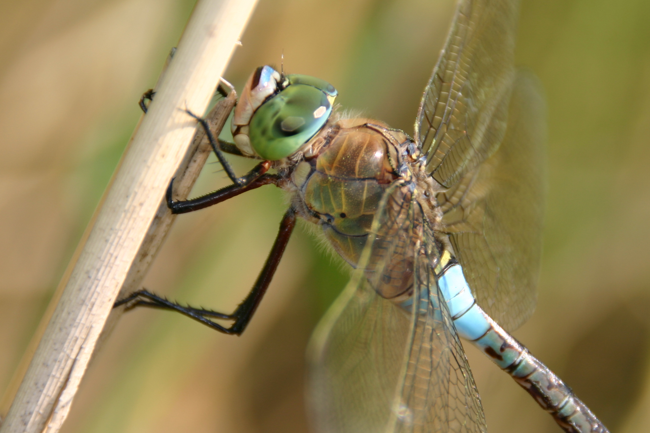 Die Kleine Königslibelle (Anax parthenope) ist eine Libellenart aus der Familie der Edellibellen (Aeshnidae), welche der Unterordnung der Großlibellen (Anisoptera) angehören. Ich habe ein Nahaufnahme des Thorax gemacht, um die Braunfärbung zu zeigen (= eine der Unterschiede zur großen Königslibelle mit "grünem Thorax").